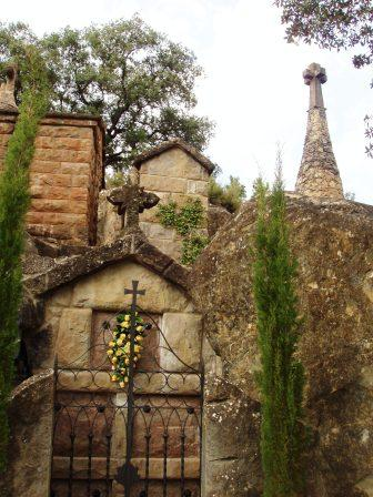 Cementiri d'Olius